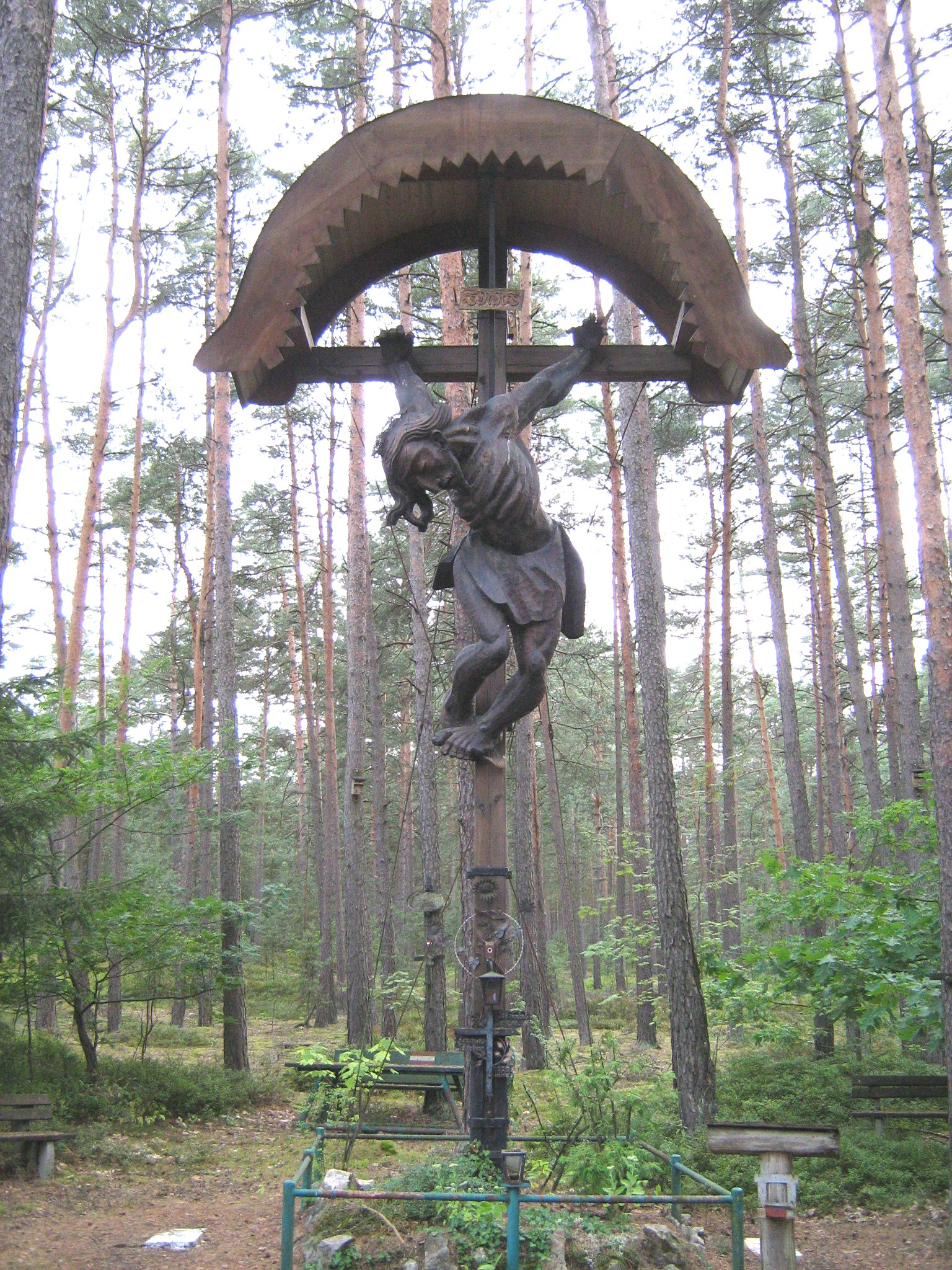 Das „Kreuz von Wackersdorf“ steht neben dem Franziskus-Marterl südöstlich der Wiederaufarbeitungsanlage Wackersdorf. Das Anti-WAA-Kreuz wurde 1986 von dem Holzbildhauer Stefan Preisl geschaffen.